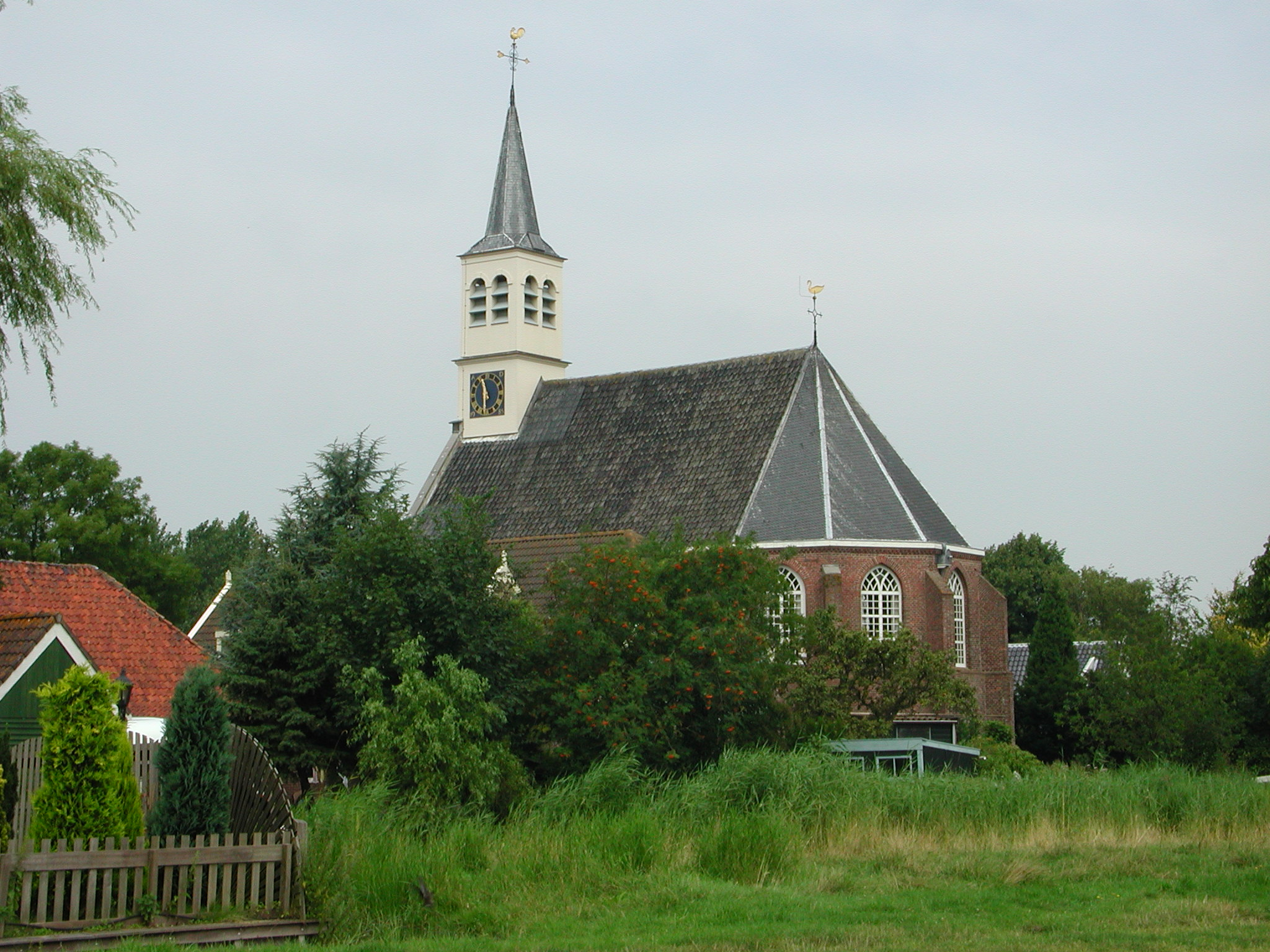 Watergang, Hervormde kerk.